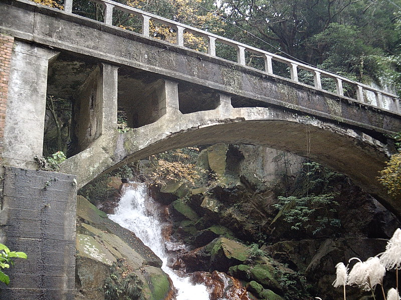 中文（台灣）: 草山水道系統第三水管橋側面。